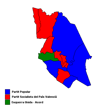 Partits polítics més votats als municipis de la Ribera Baixa (País Valencià) després de les eleccions municipals de 2007.